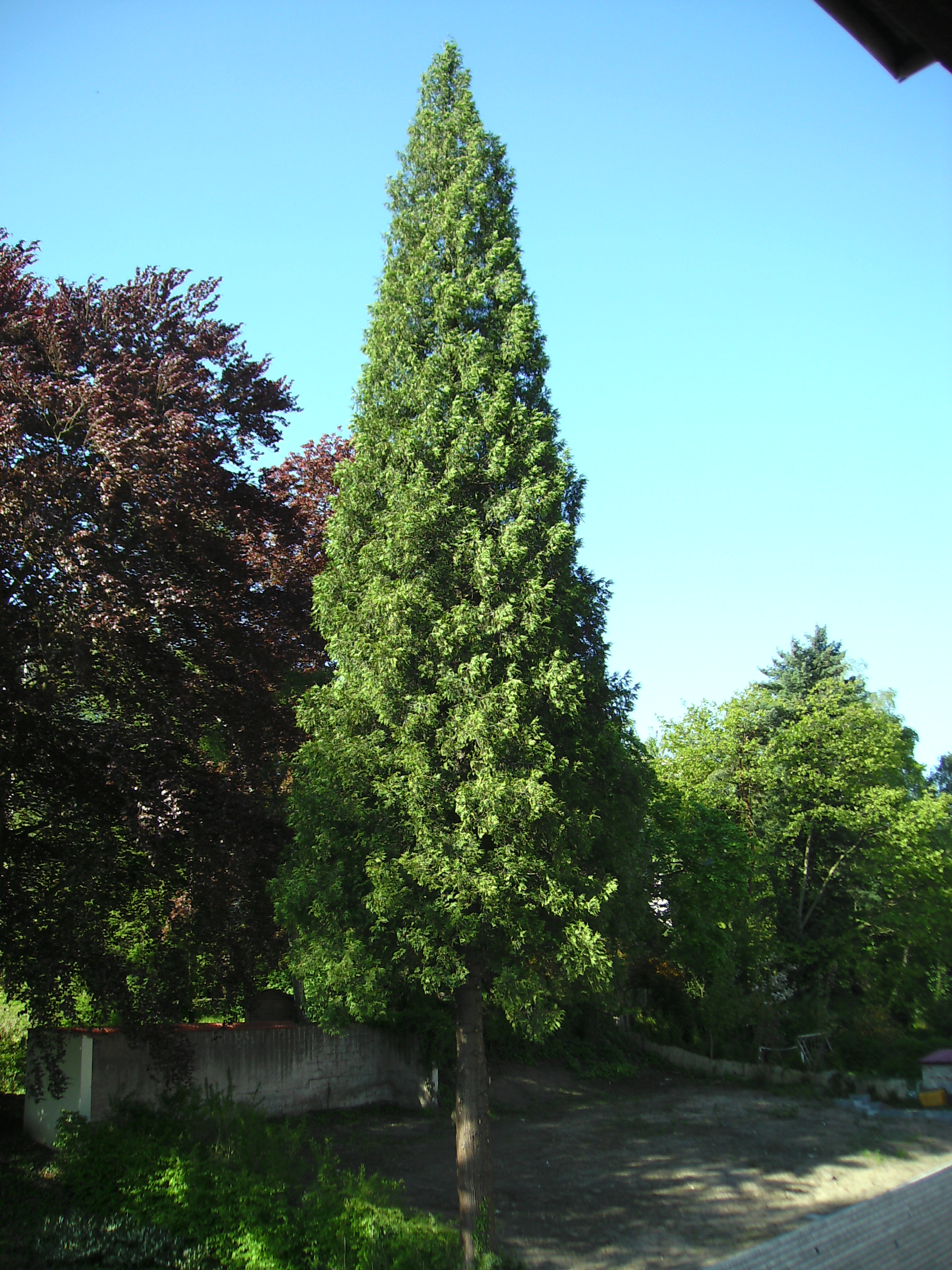 Riesen-Lebensbaum (Thuja) in einem Landschaftspark in Saarbrücken